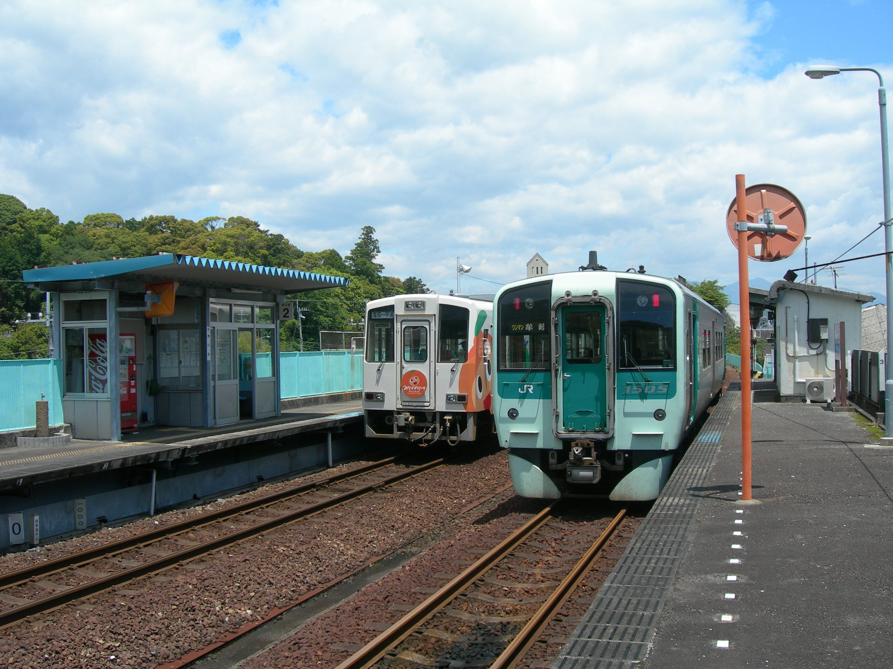 海部駅ホーム